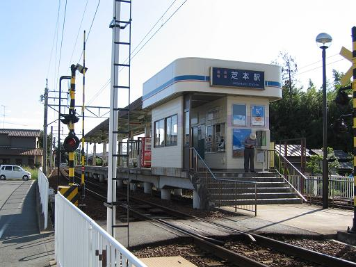 遠州芝本駅